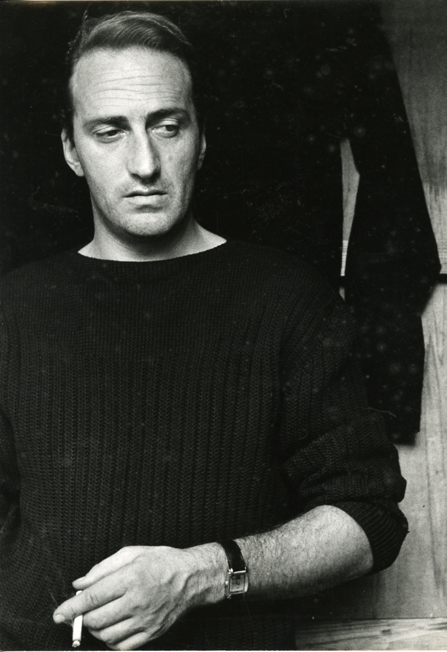 Servizio fotografico : Italia, 1955 / Paolo Monti. - Stampe: 2 : Positivo b/n, gelatina bromuro d'argento/ carta, 24x30. - ((Al verso delle stampe manoscritto: "Il pittore Roberto Crippa 1955". Sul coperchio della scatola manoscritto: "Ritratti Artisti".